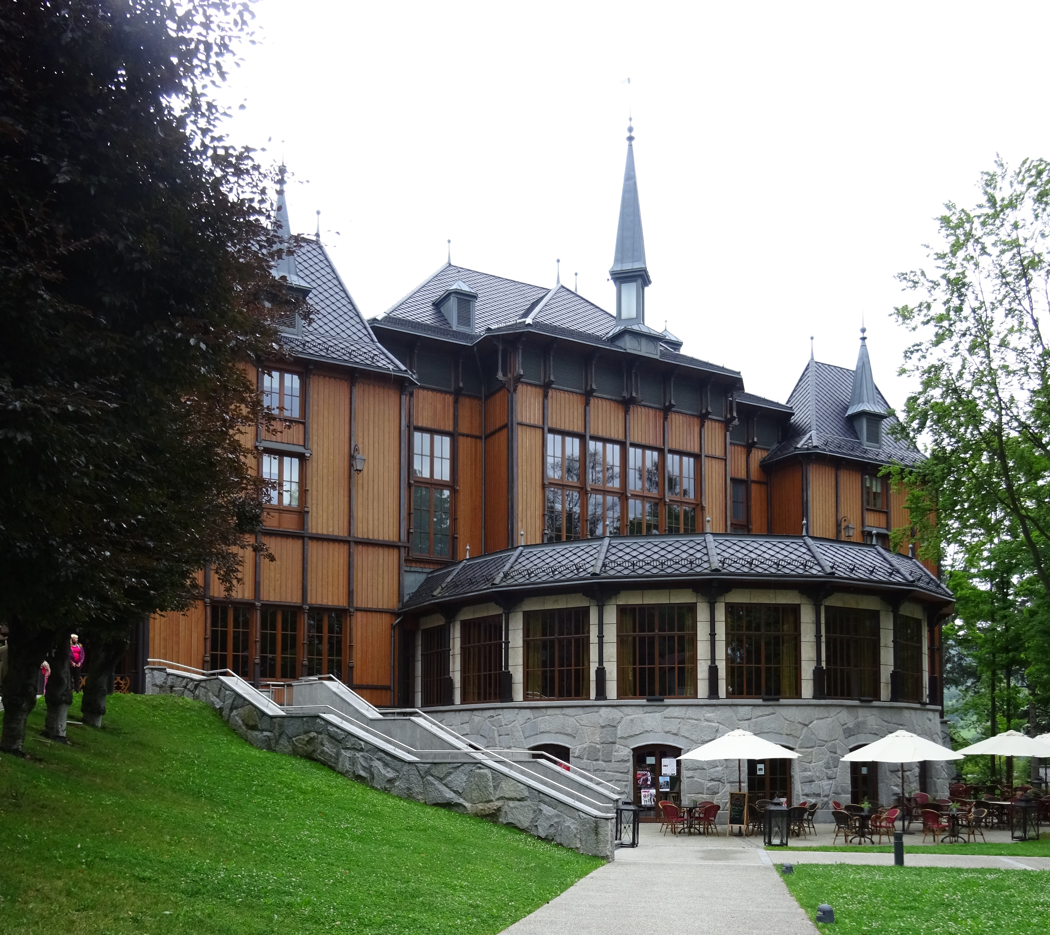 Dworek Gościnny w Szczawnicy.